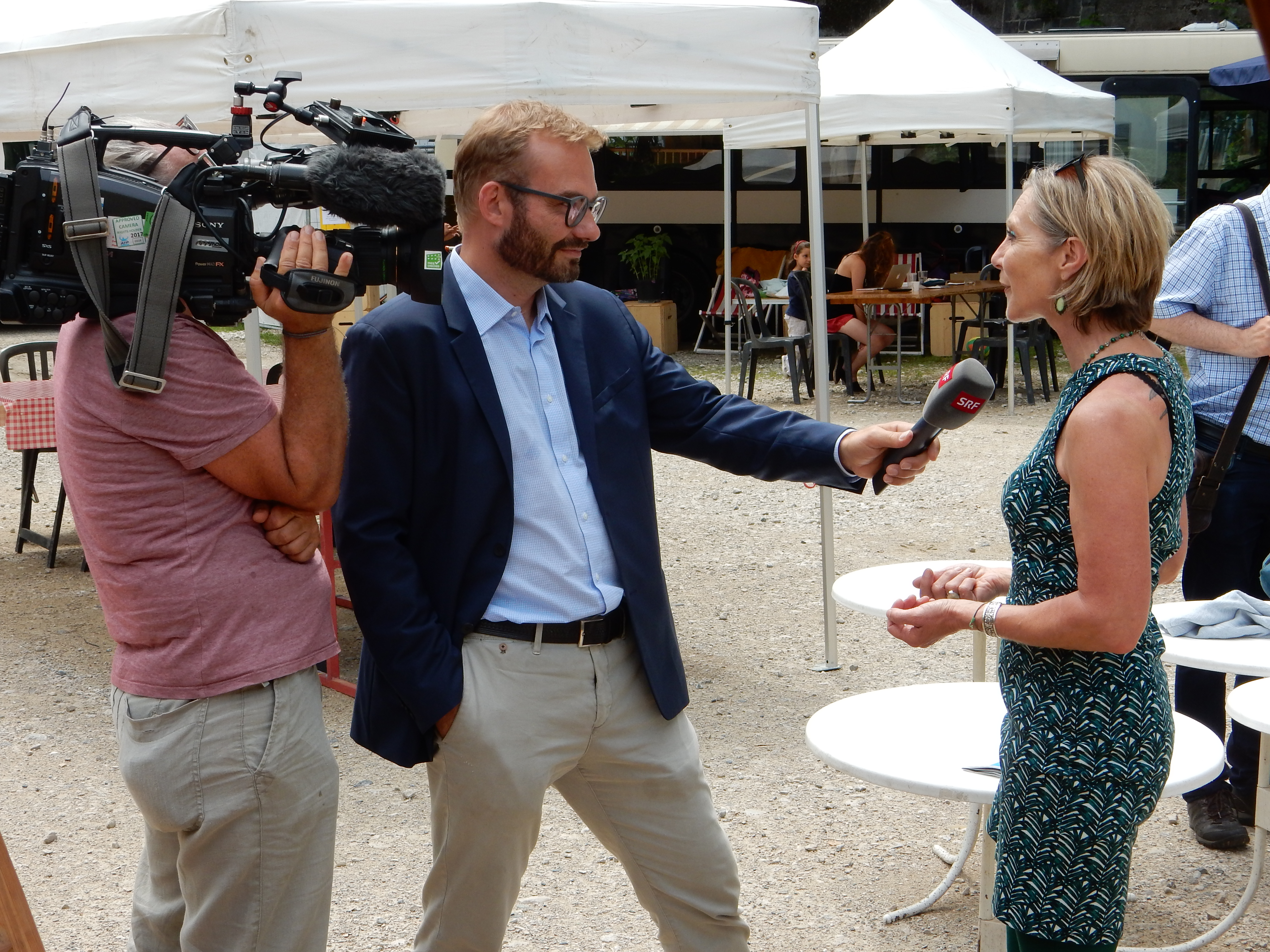 Die Schweizer Nationalrätin Maya Graf im Interview mit Erwin Schmid vom Schweizer Fernsehen SRF